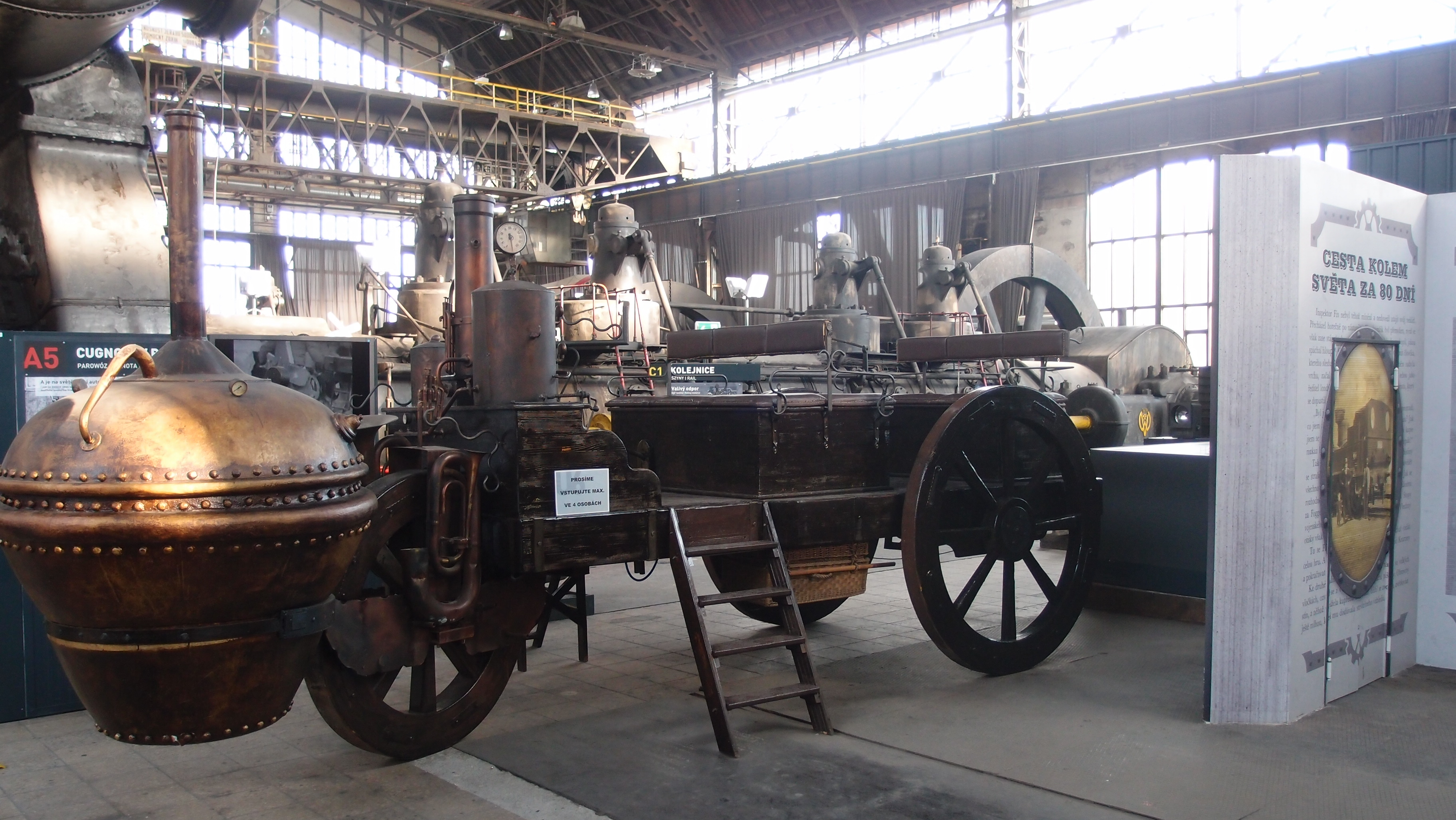 Cugnotův parovůz, jeden z exponátů Malého světa techniky U6.